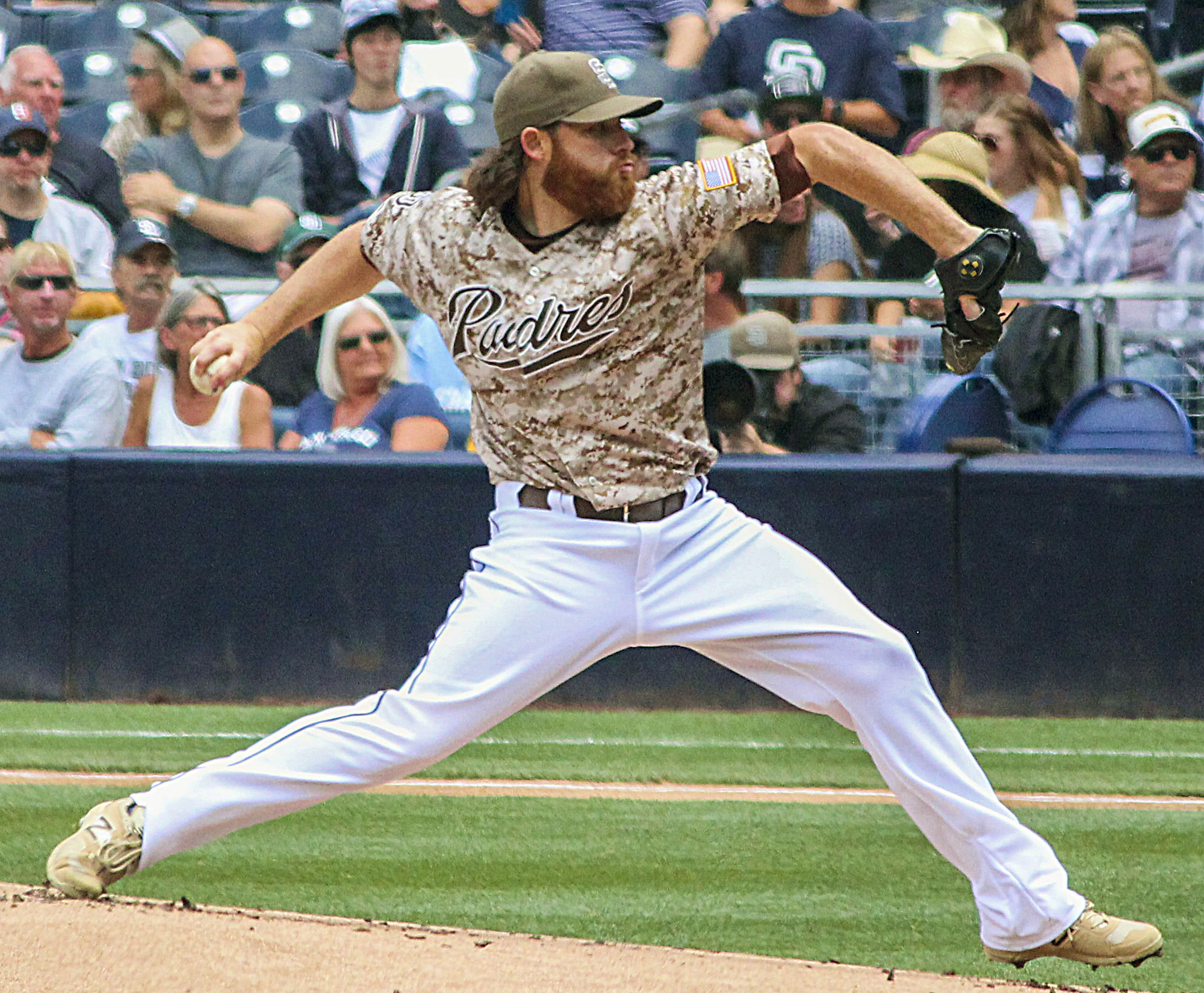 Ian Kennedy